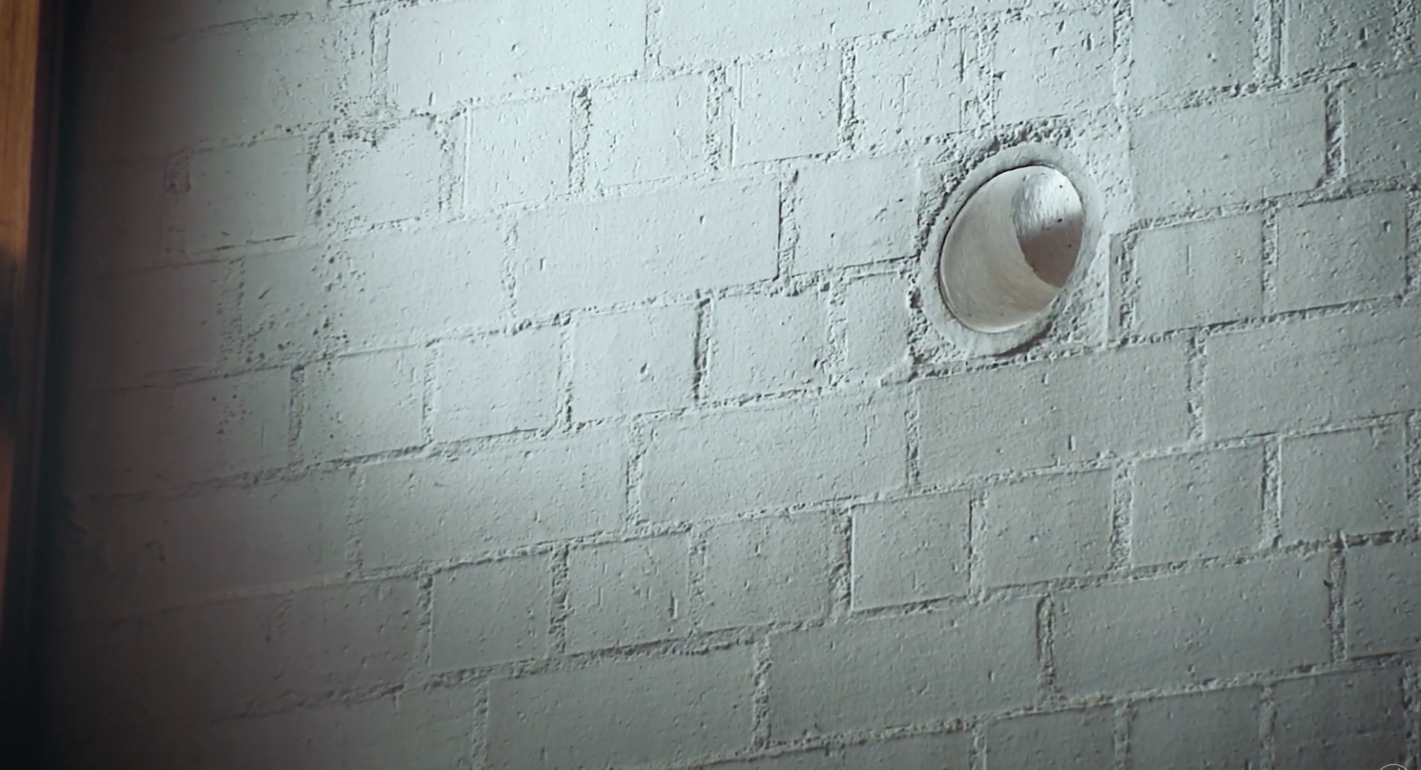 Dieses Bild zeigt die Öffnung in der südlichen Altarrückwand in St.Benedikt zu Regensburg, die das sogenannte "BeneLux" am 11.Juli ermöglicht.